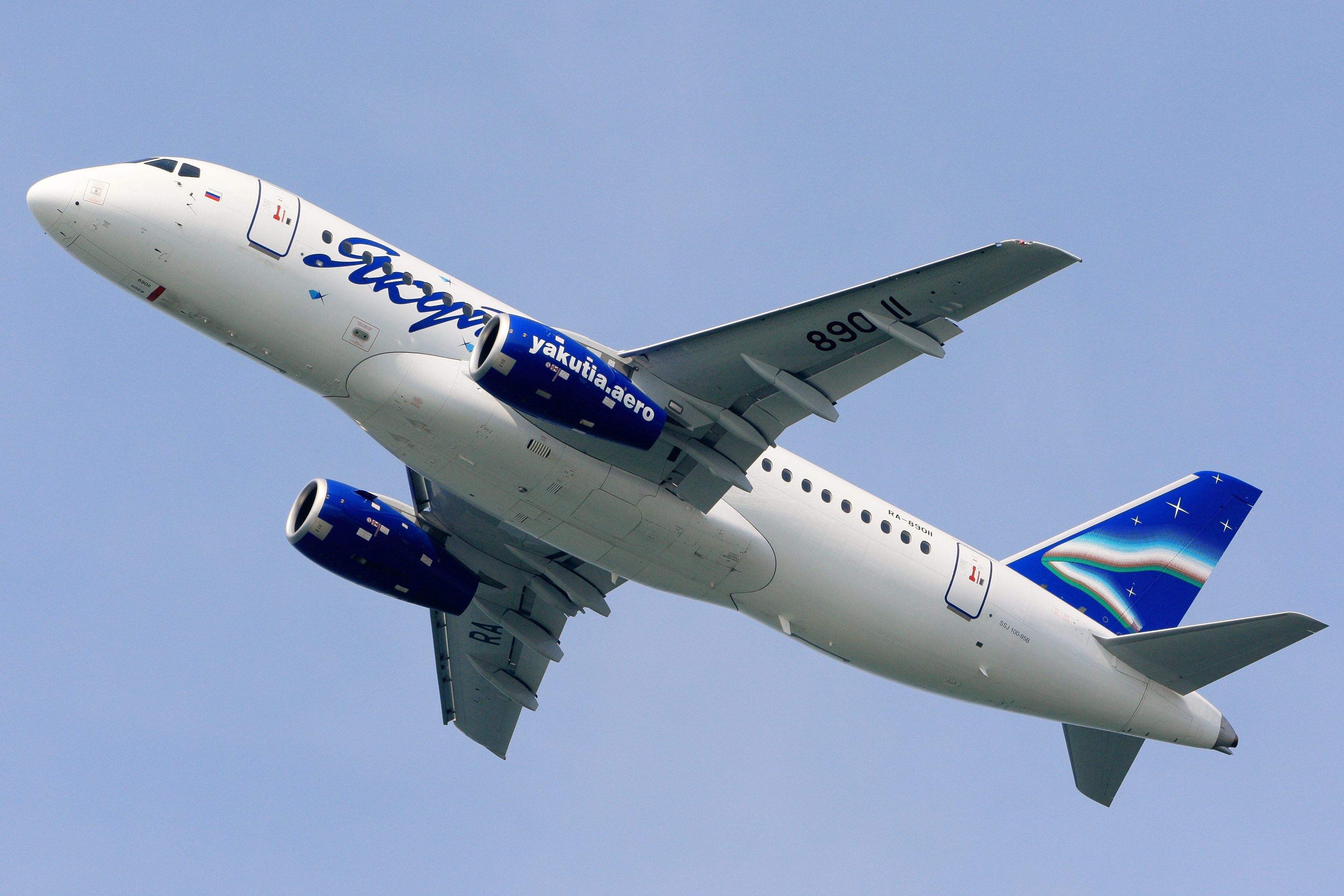 新潟空港で撮影された、ヤクーチヤ航空のスホーイ・スーパージェット100